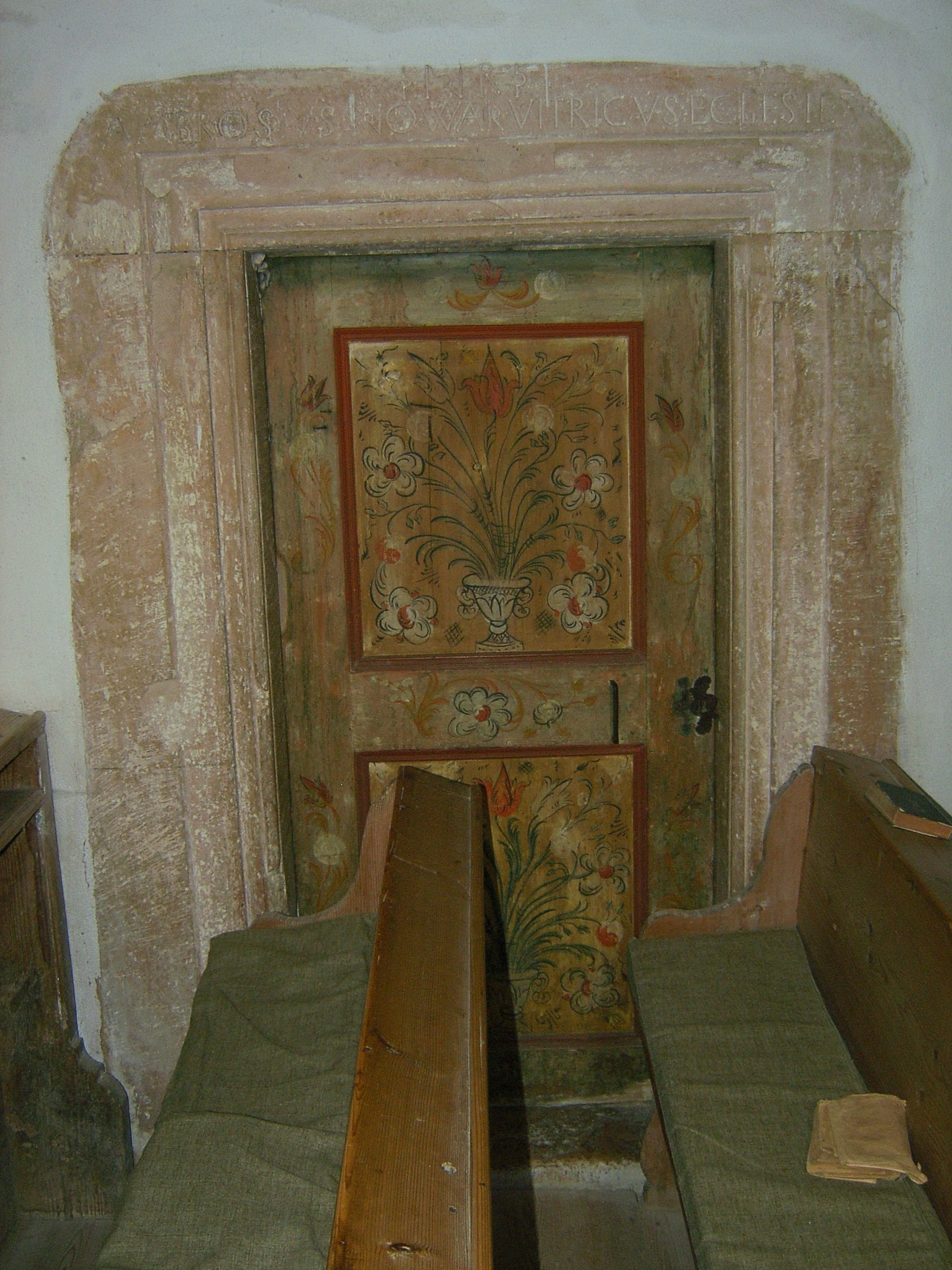 Magyargyerőmonostori református templom sekrestyeajtaja (Erdély)